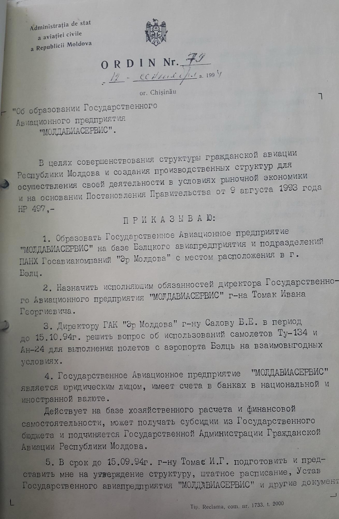 Ordin nr.79 privind crearea întreprinderii de stat Moldaeroservice la aeroport Bălți-Leadoveni